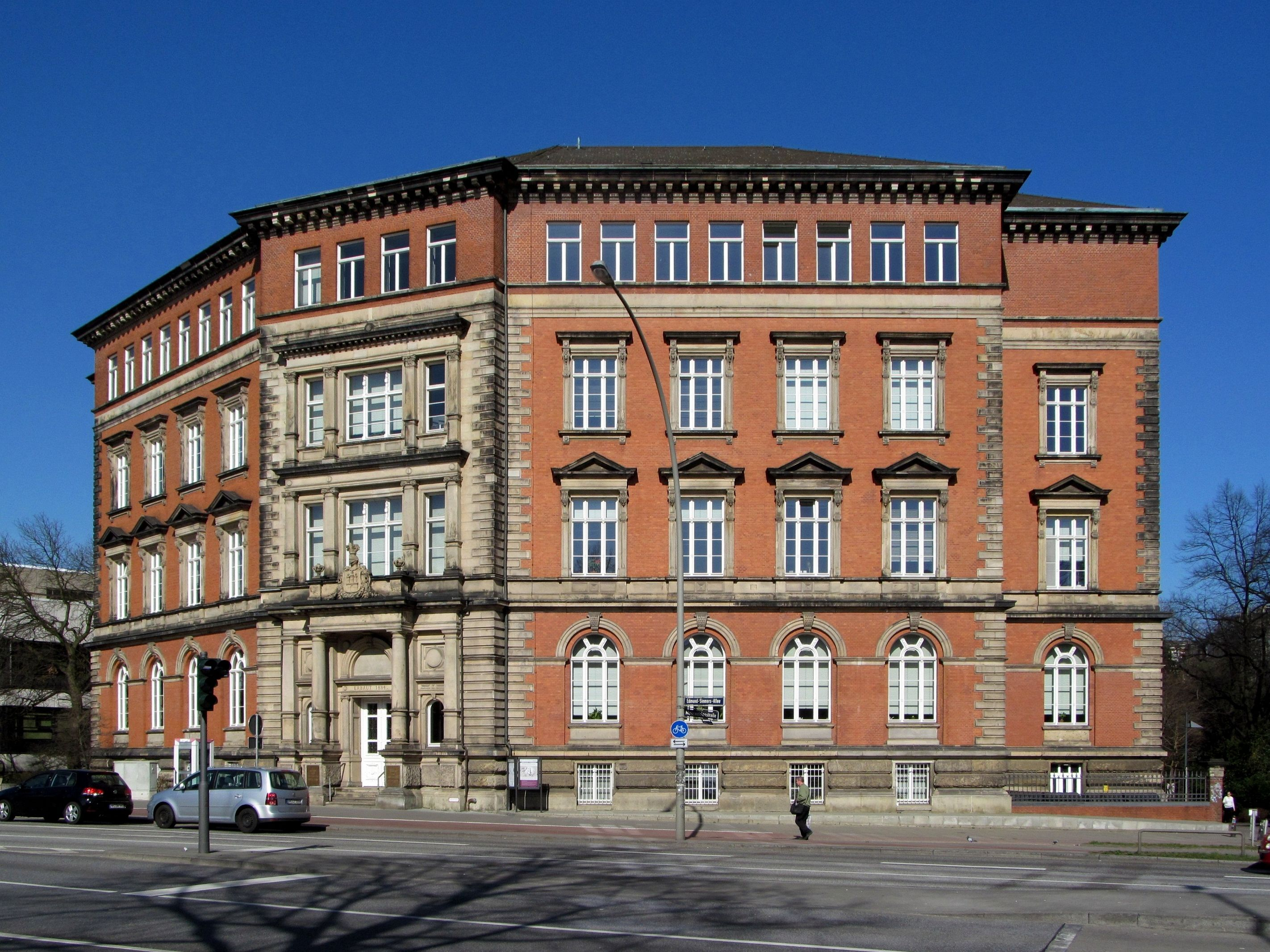 ehem. Wilhelmgymnasium in Hamburg, erbaut 1883/85 von Carl Johann Christian Zimmermann, jetzt Altbau der Staats- und Universitätsbibliothek. This is a photograph of an architectural monument.